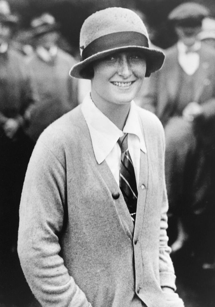 Simone de la Chaume